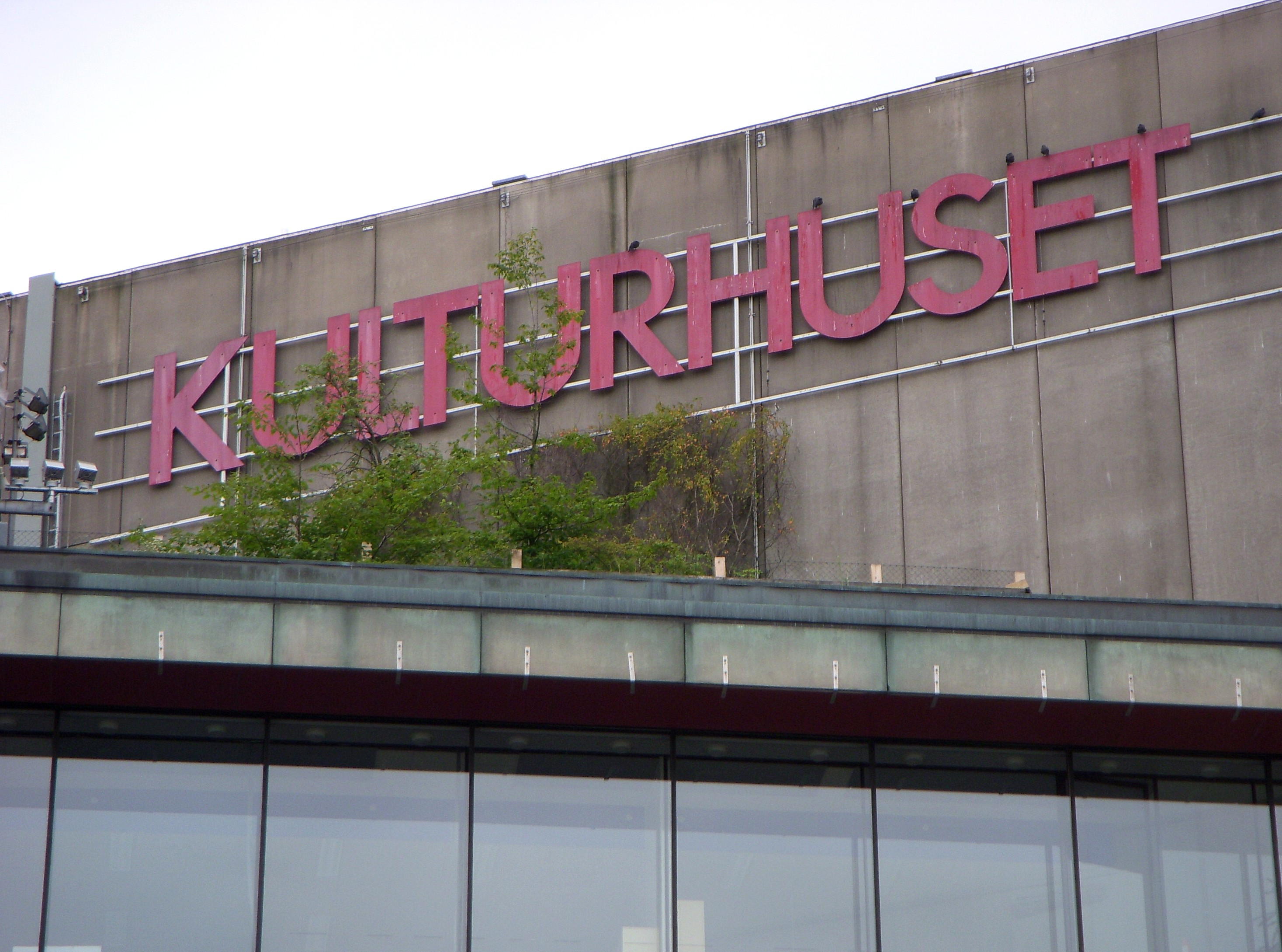 Kulturhuset i Stockholm